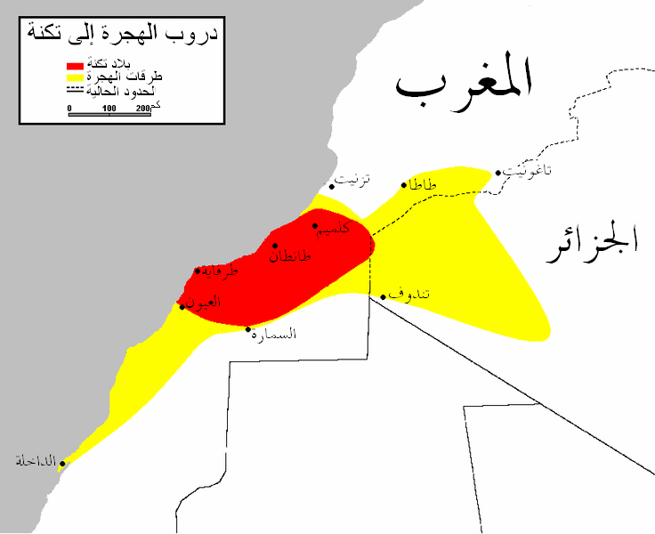 خارطة لبلاد تكنة (بالأحمر) وطرق الهجرة والتجارة المحيطة بها (بالأصفر) في المغرب.